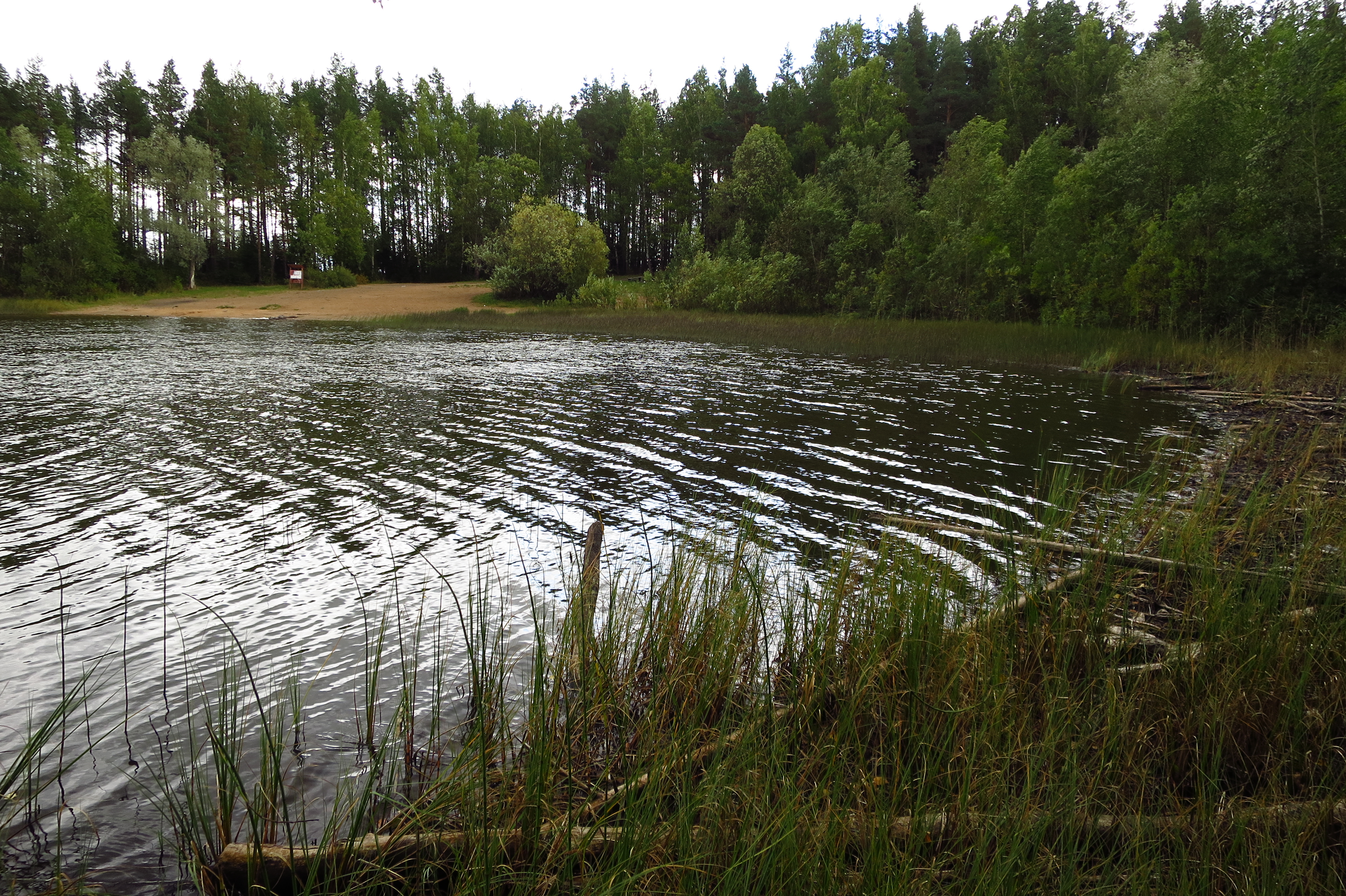 Kurtna Liivjärv Kurtna maastikukaitsealal